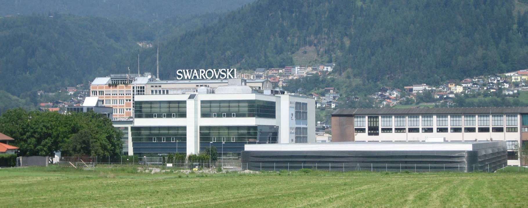 Swarowski Gebaude